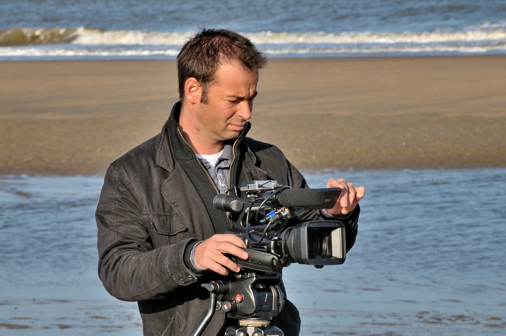 Peter van der Vorst tijdens prinsjesdag.